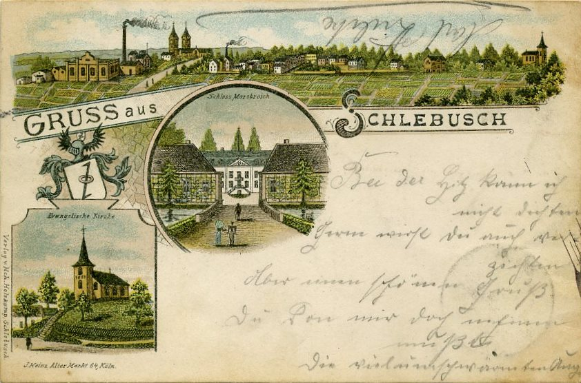 Gruss aus Schlebusch - liho 1898 Evangelische Kirche -Schloss Morrsbroich